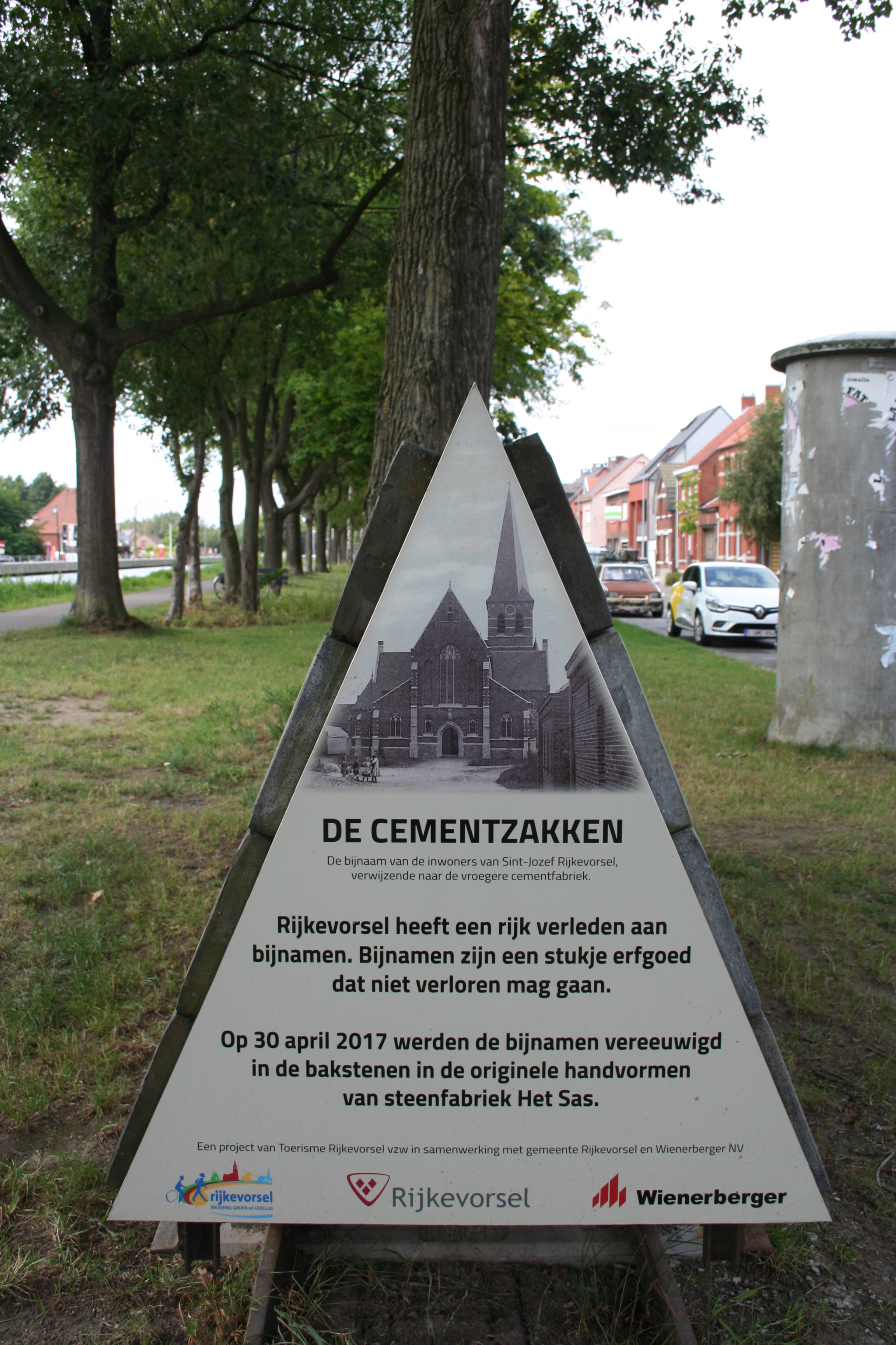 Project van Toerisme Rijkevorsel om de bijnamen gangbaar in Rijkevorsel te vereeuwigen.